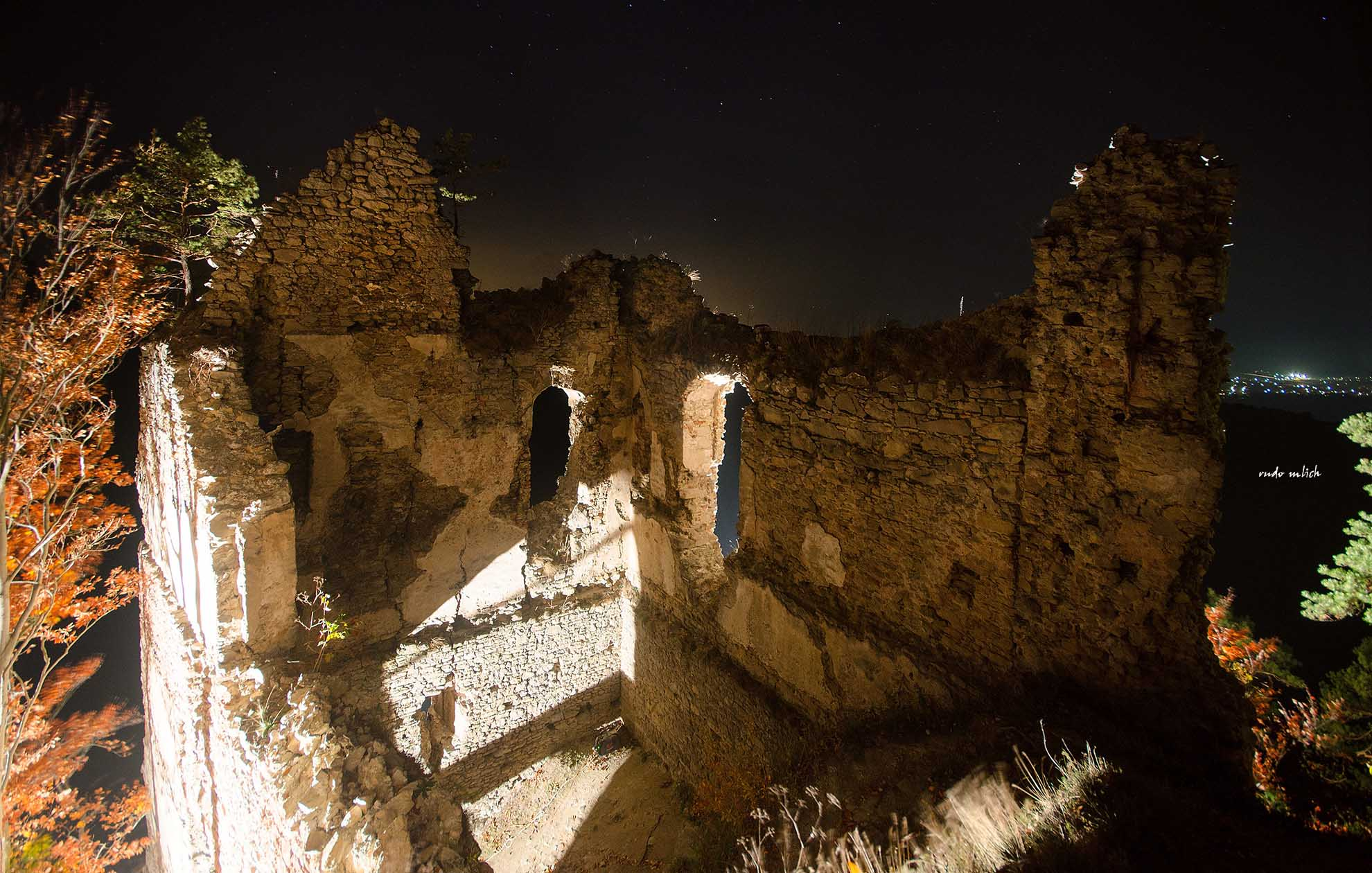 Palác hradu